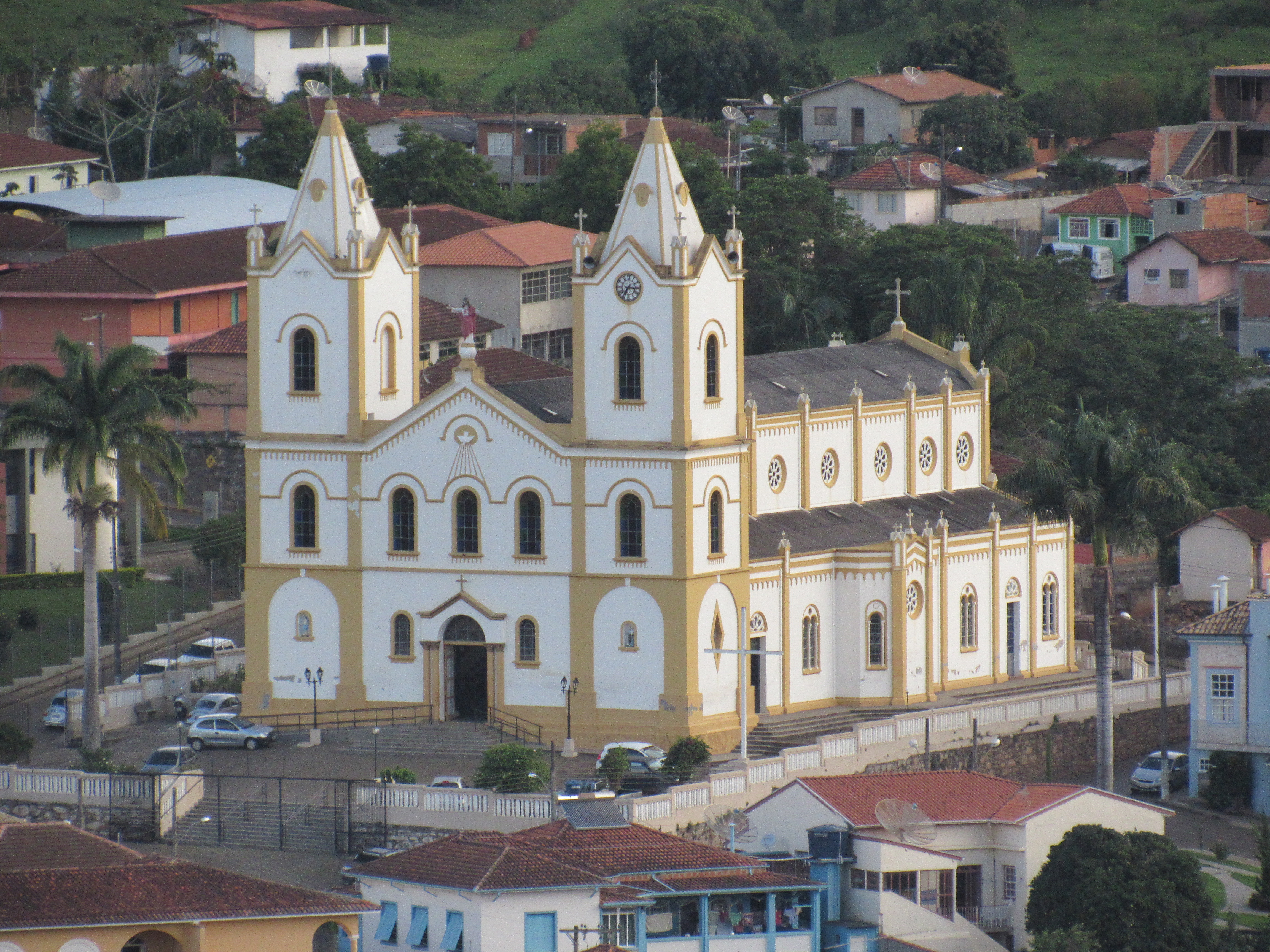 Igreja Matriz do Divino Espírito Santo - Cristina/MG